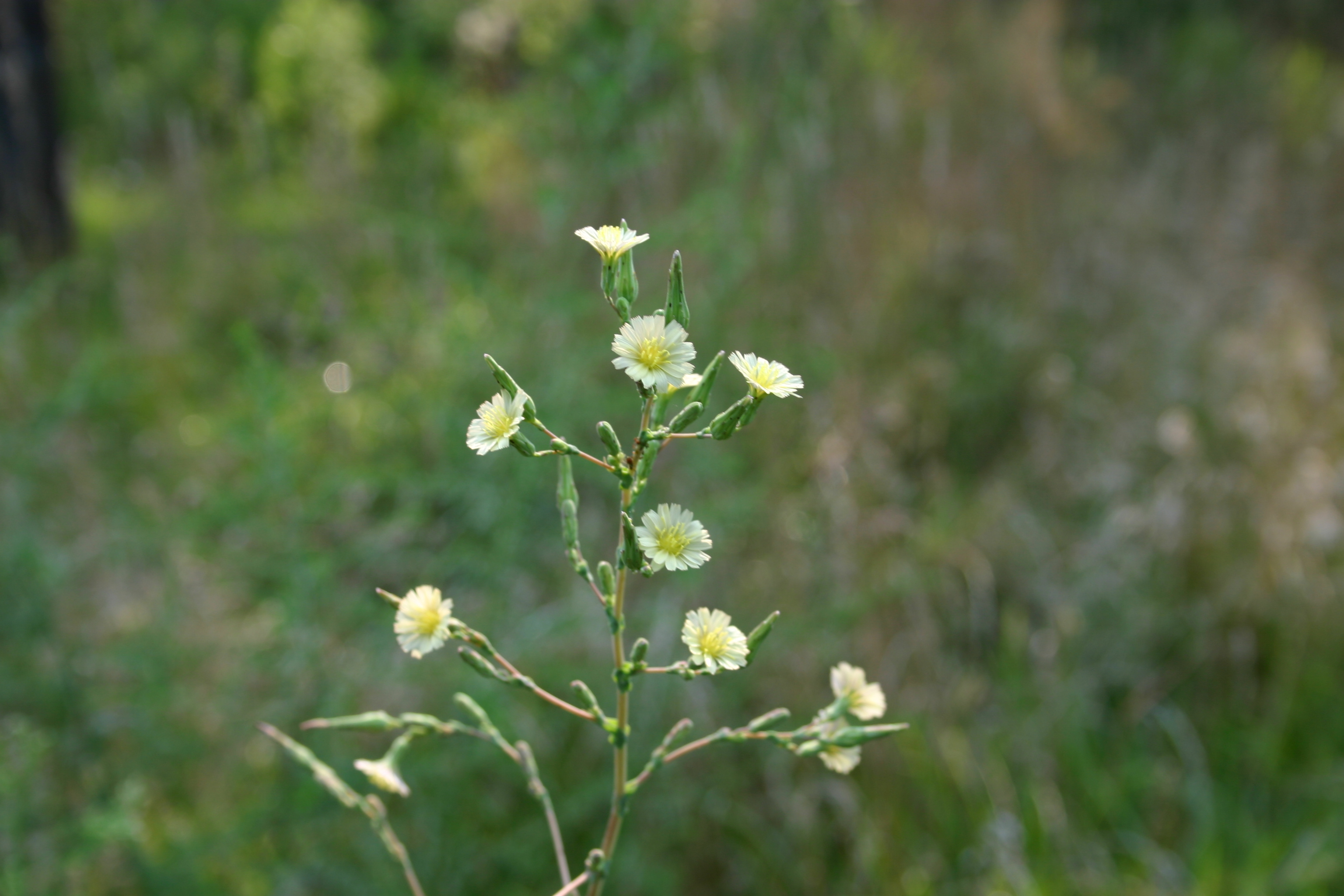 Lactuca serriola